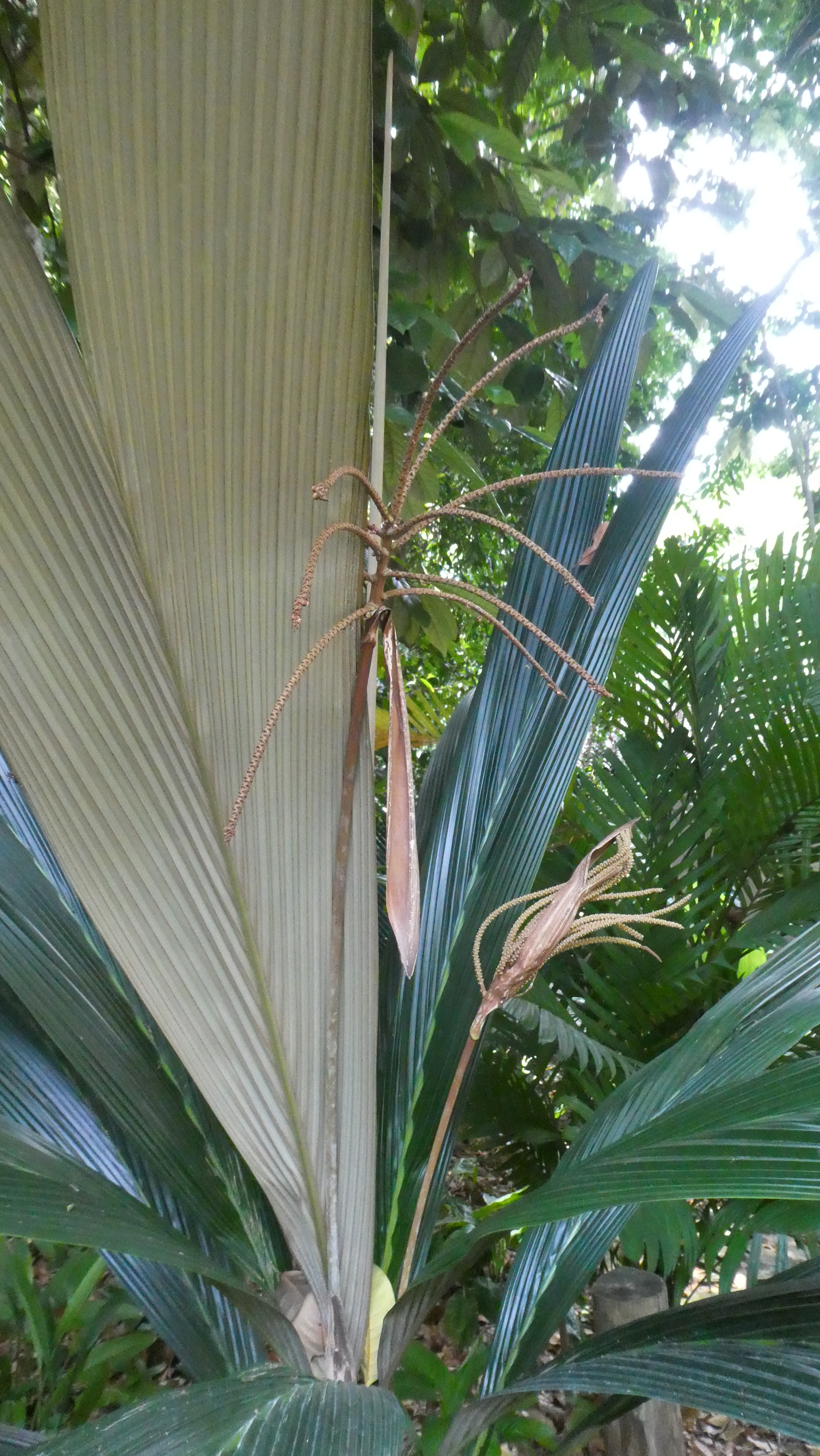 Jardin Botanique de Singapour inflorescence du palmier Sommieria leucophylla